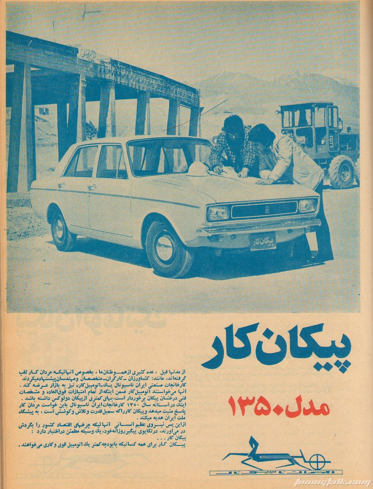 Car Magazine-Paykan Javanan Advertisements-1971 تبلیغ پیکان جوانان-مجله ماشین 1350